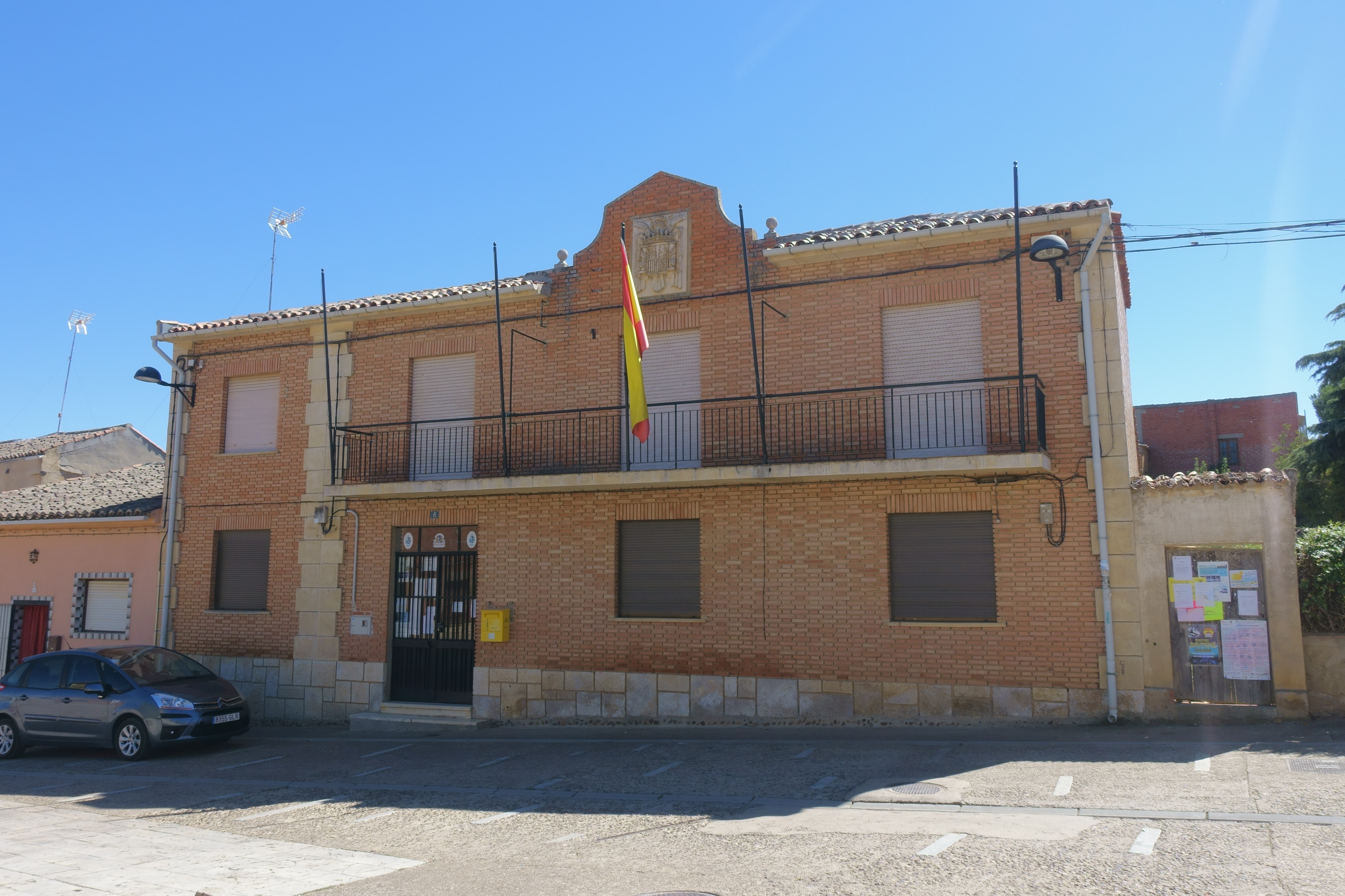 Casa consistorial de Santervás de Campos (Valladolid, España).